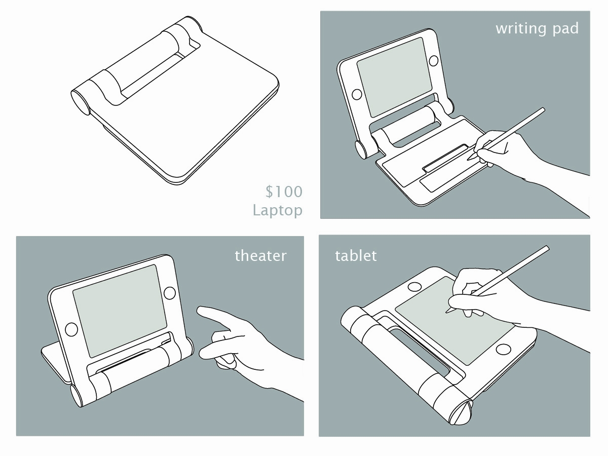 $100 Laptop prototype